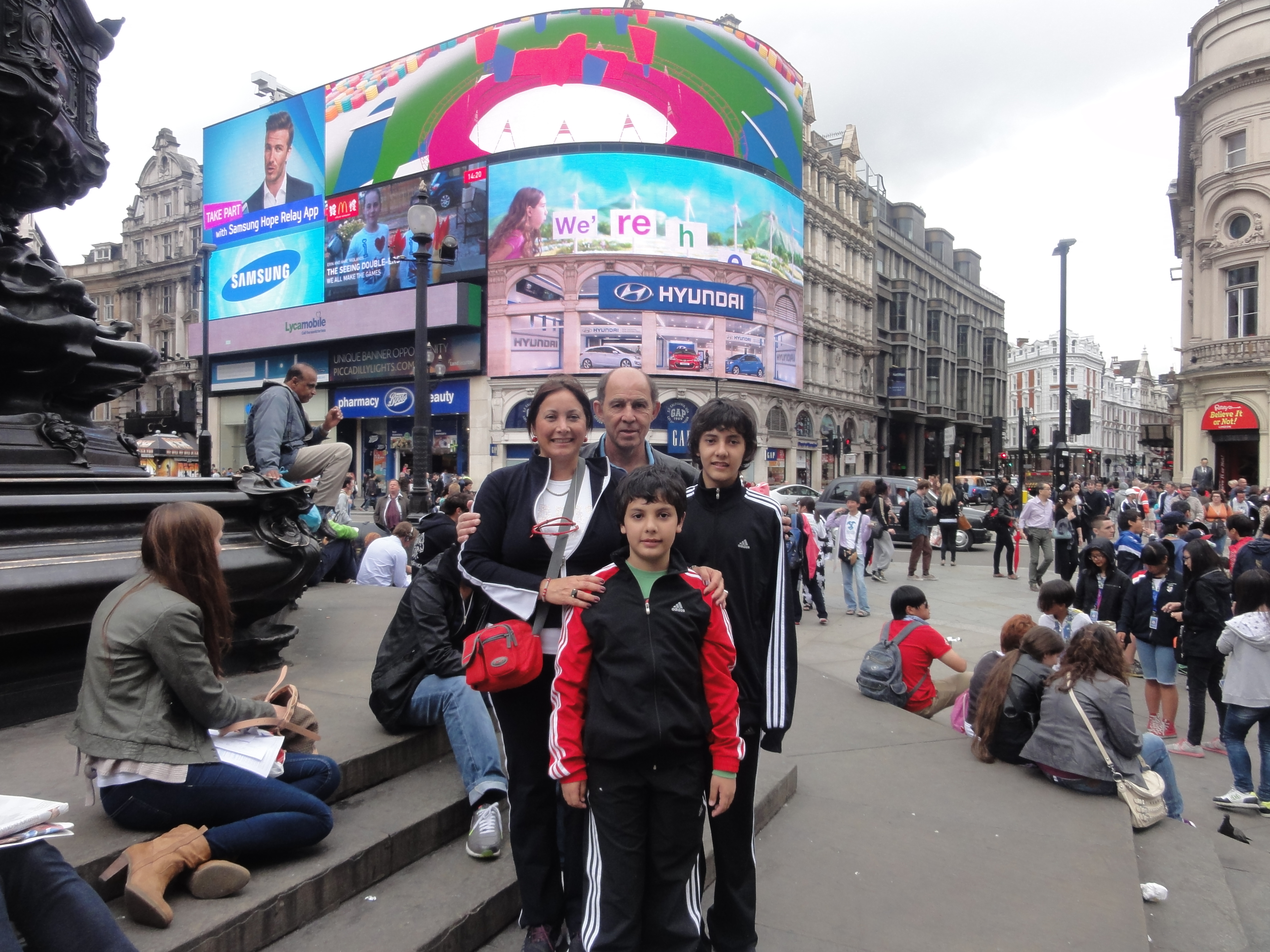 familia de ricardo bochini